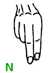 Buchstabe N im deutschen Fingeralphabet, gemäß einer Infokarte des Landesverbandes Bayern der Gehörlosen e.V. (